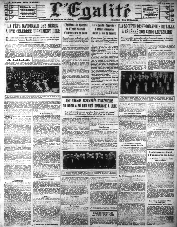 Journal L'Egalite de Roubaix Tourcoing 1930 05 26